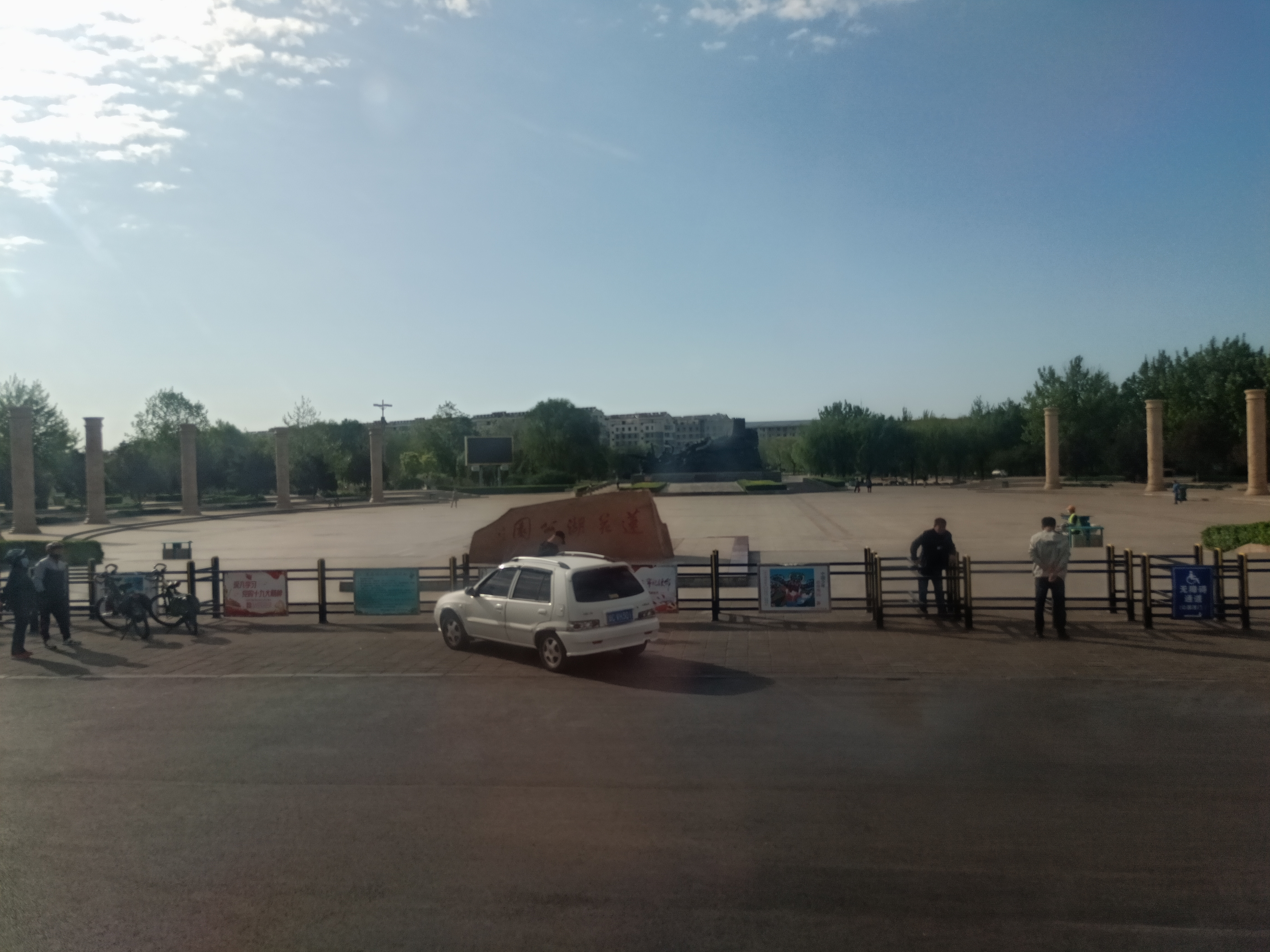 粵語: 山海關蓮花湖公園